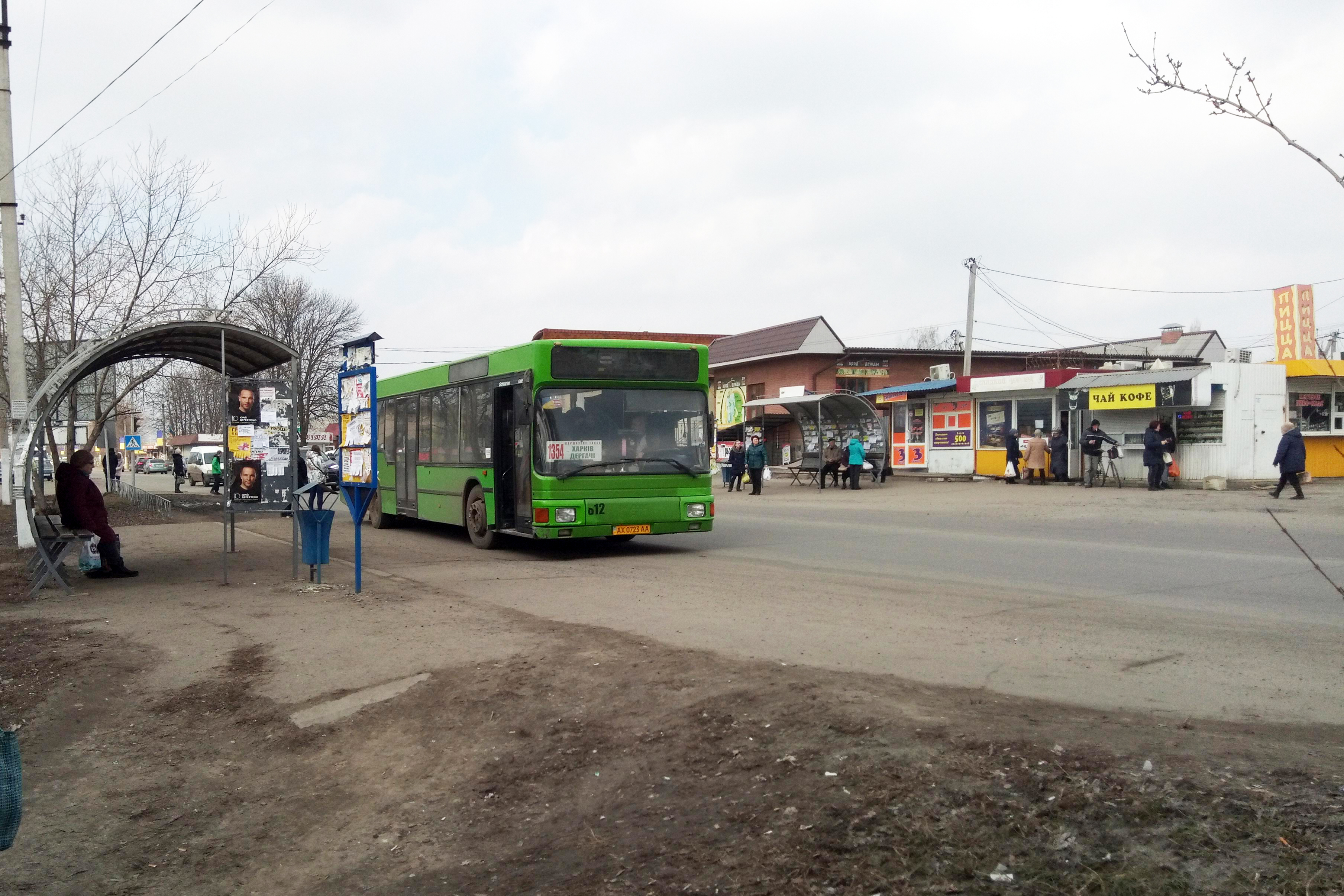 На фото зображено автобус марки МАЗ зеленого кольору, що стоїть на автобусній зупинці. На дальньому плані - торгівельні кіоски.